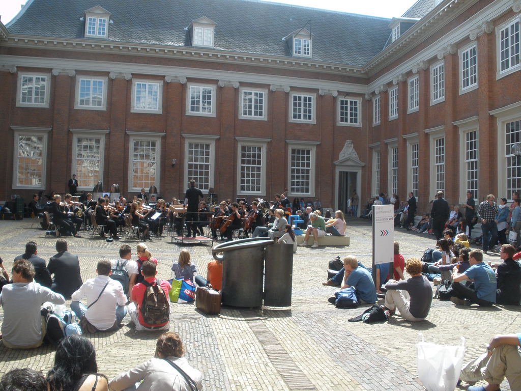 Concert in 2010 op de binnenplaats van het Amsterdam Museum